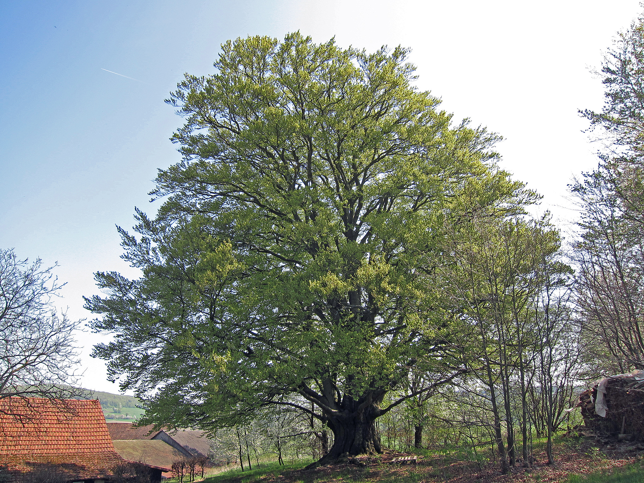 Hannesebuche Schönderling